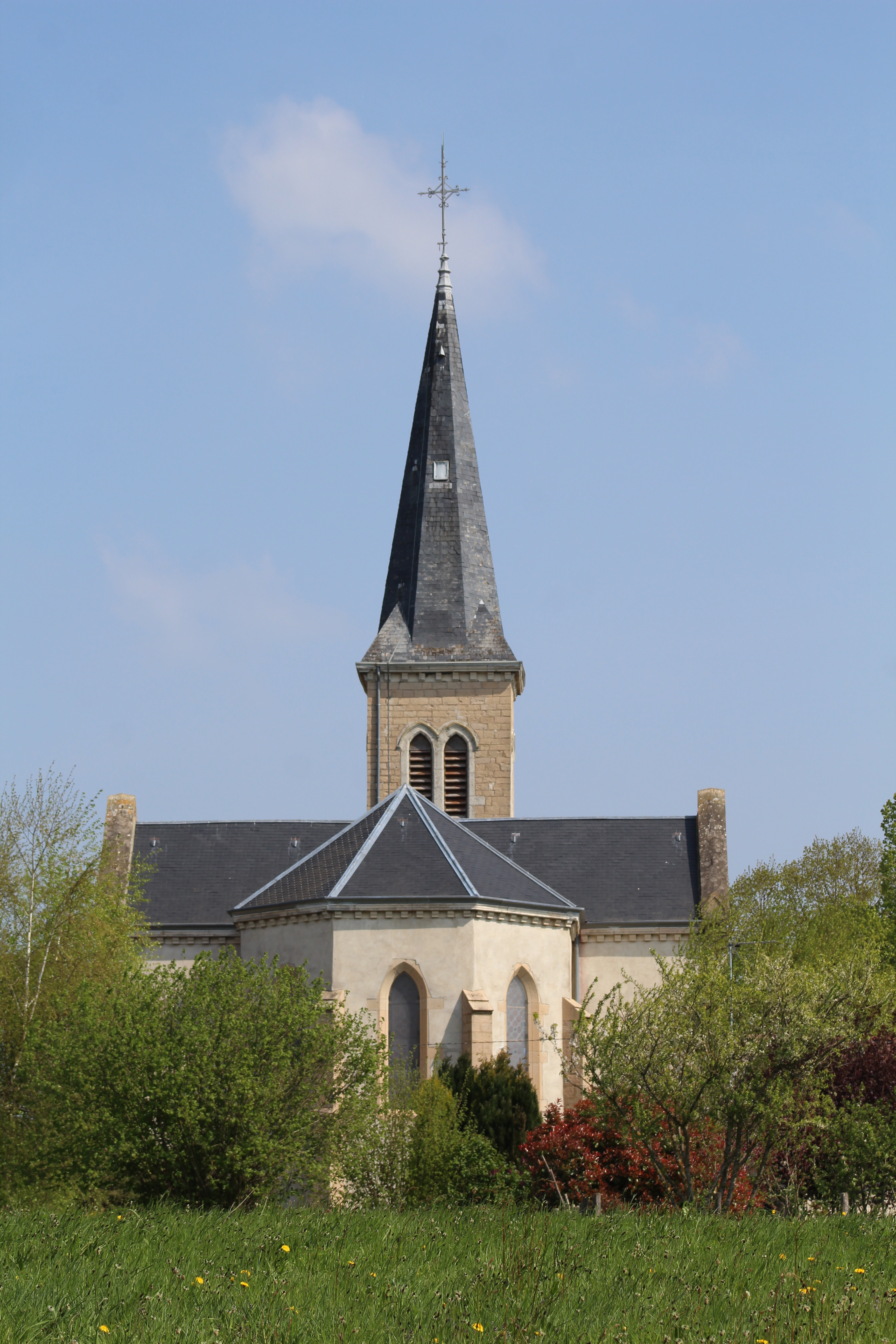 Église Saint-Barthélemy de Servignat.